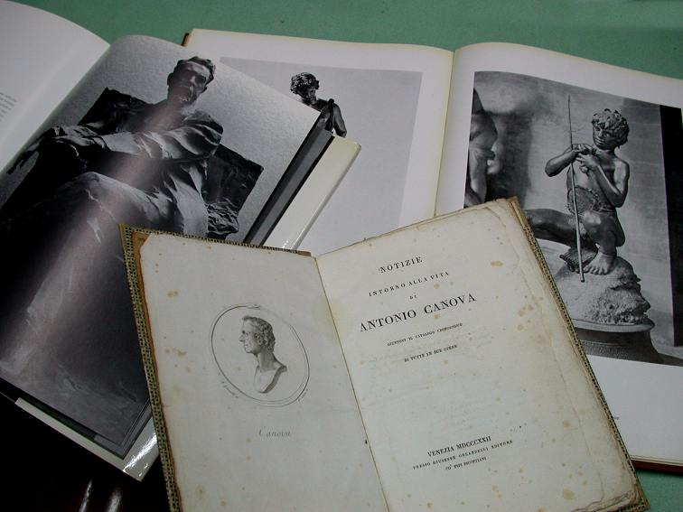 Fondo Guidoni, donazione del Prof. Enrico Guidoni. Biblioteca Michelangiolesca, Caprese Michelangelo (AR)